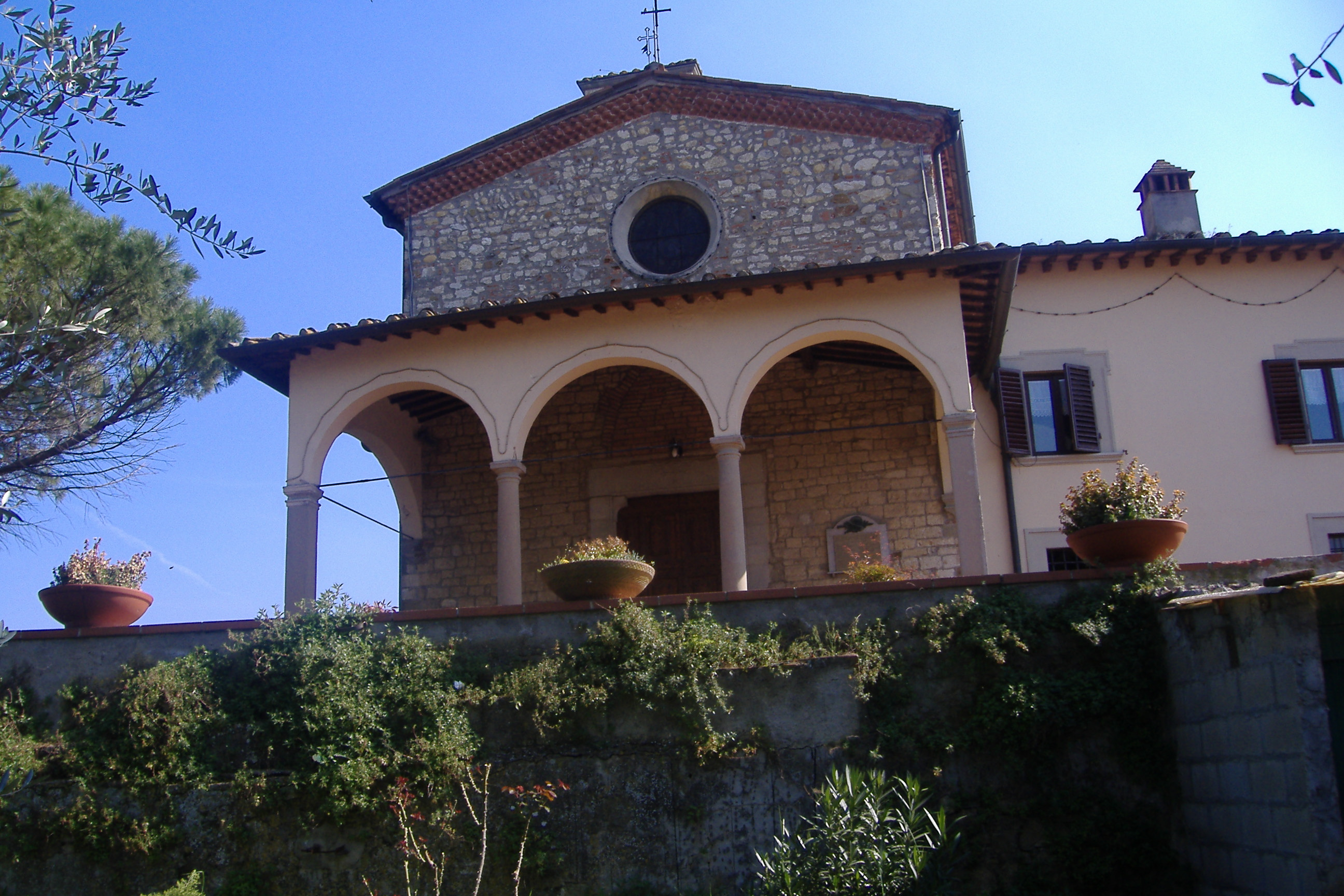 Foto personale,facciata della Chiesa di Santa Maria a Quarto, Bagno a Ripoli, Marzo 2007. Licensing Categoria:Bagno a Ripoli